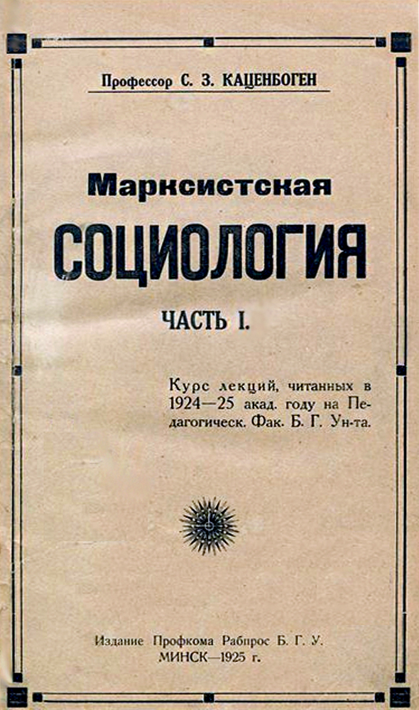 Тытульны ліст выдання: Марксистская социология: курс лекций, читанных в 1924―25 академическом году на Педагогическом факультете БГУ профессором С. З. Каценбогеным: В 2 ч. — Мн.: Издание профкома рабпрос БГУ, 1925.